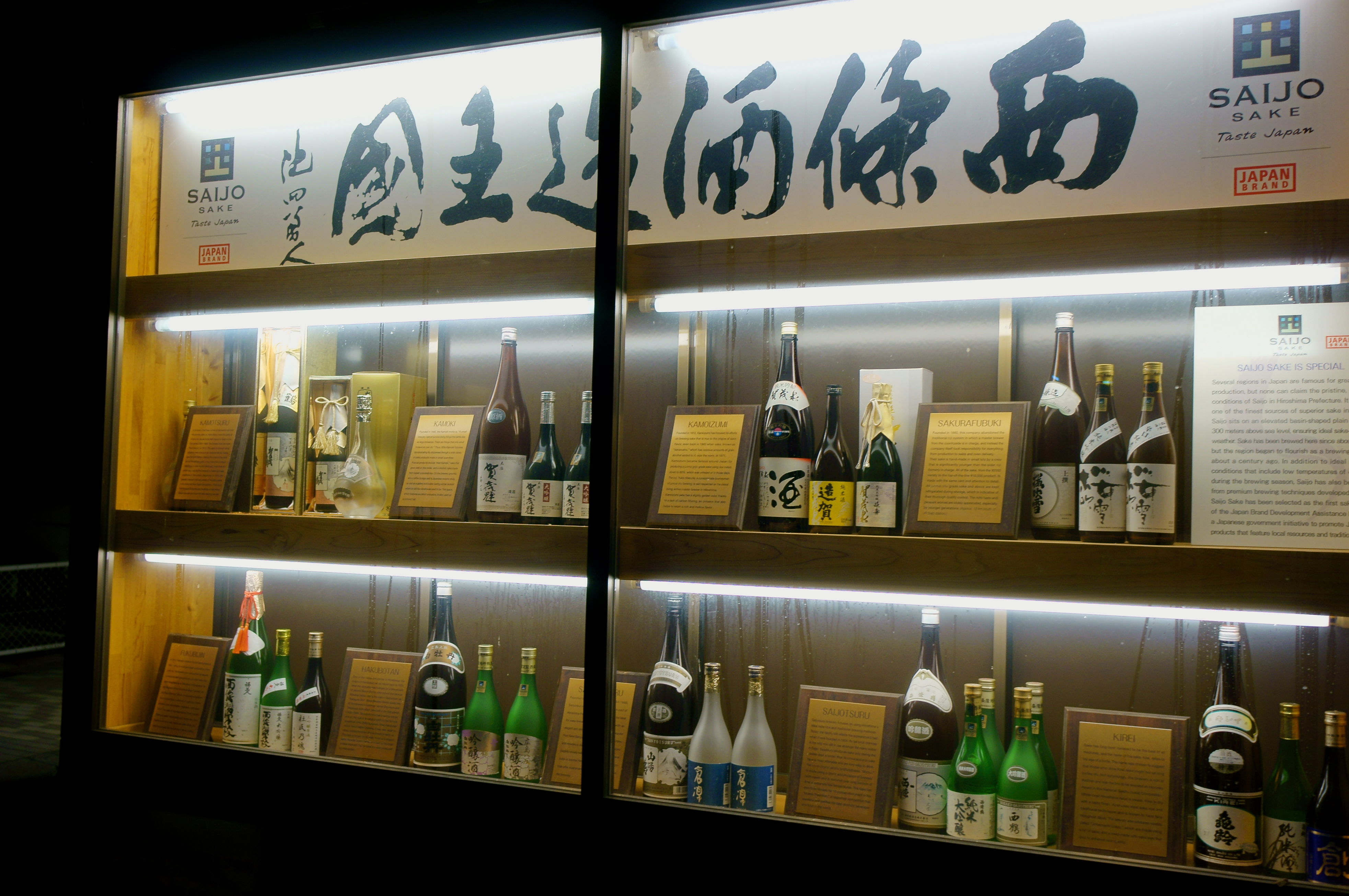 酒蔵横丁展示コーナー（西条町、2014年4月）